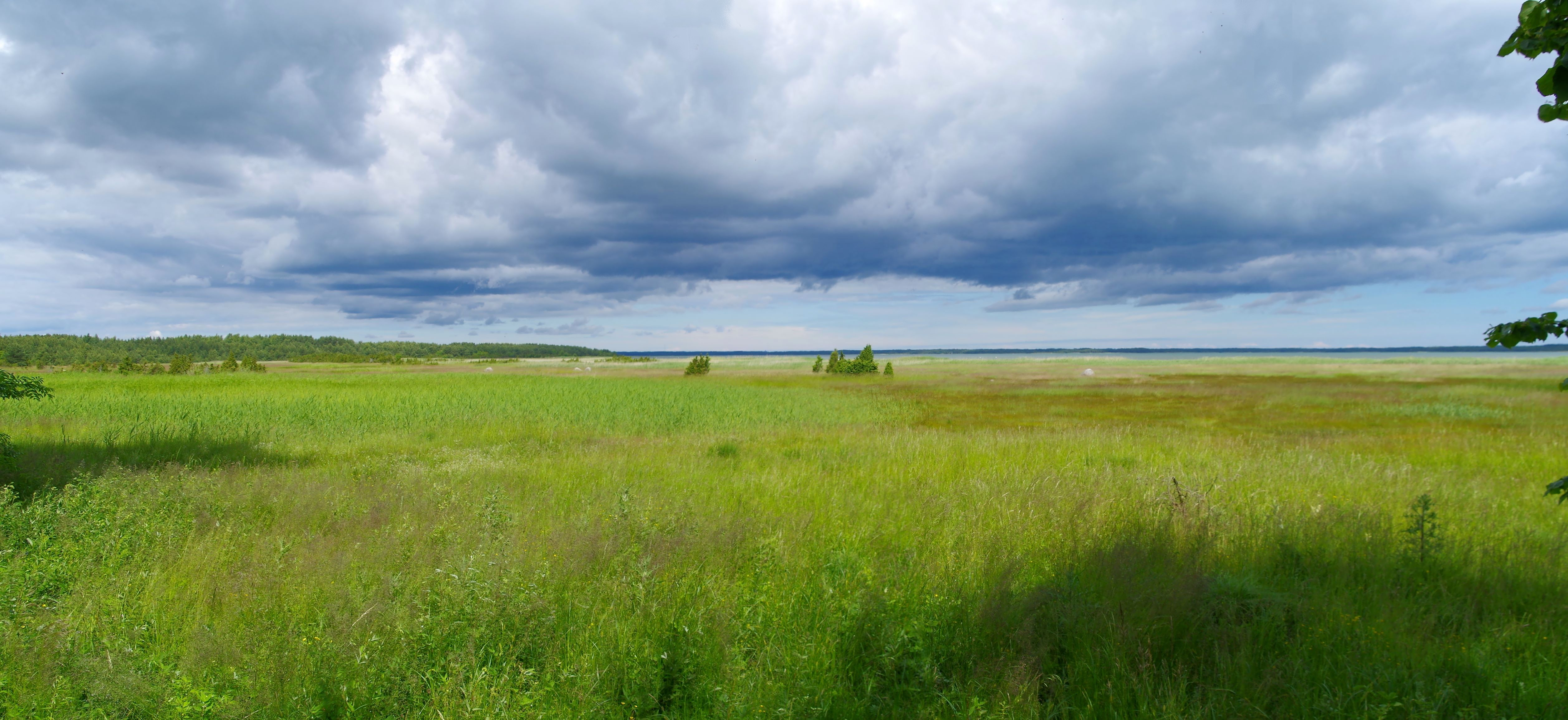 Saarnaki laid on ligikaudu 140 hektari suurune laid Väinameres Hiiumaast kagus Salinõmme küla territooriumil. Saar kuulub Hiiumaa laidude maastikukaitseala laidude sihtkaitsevööndisse.